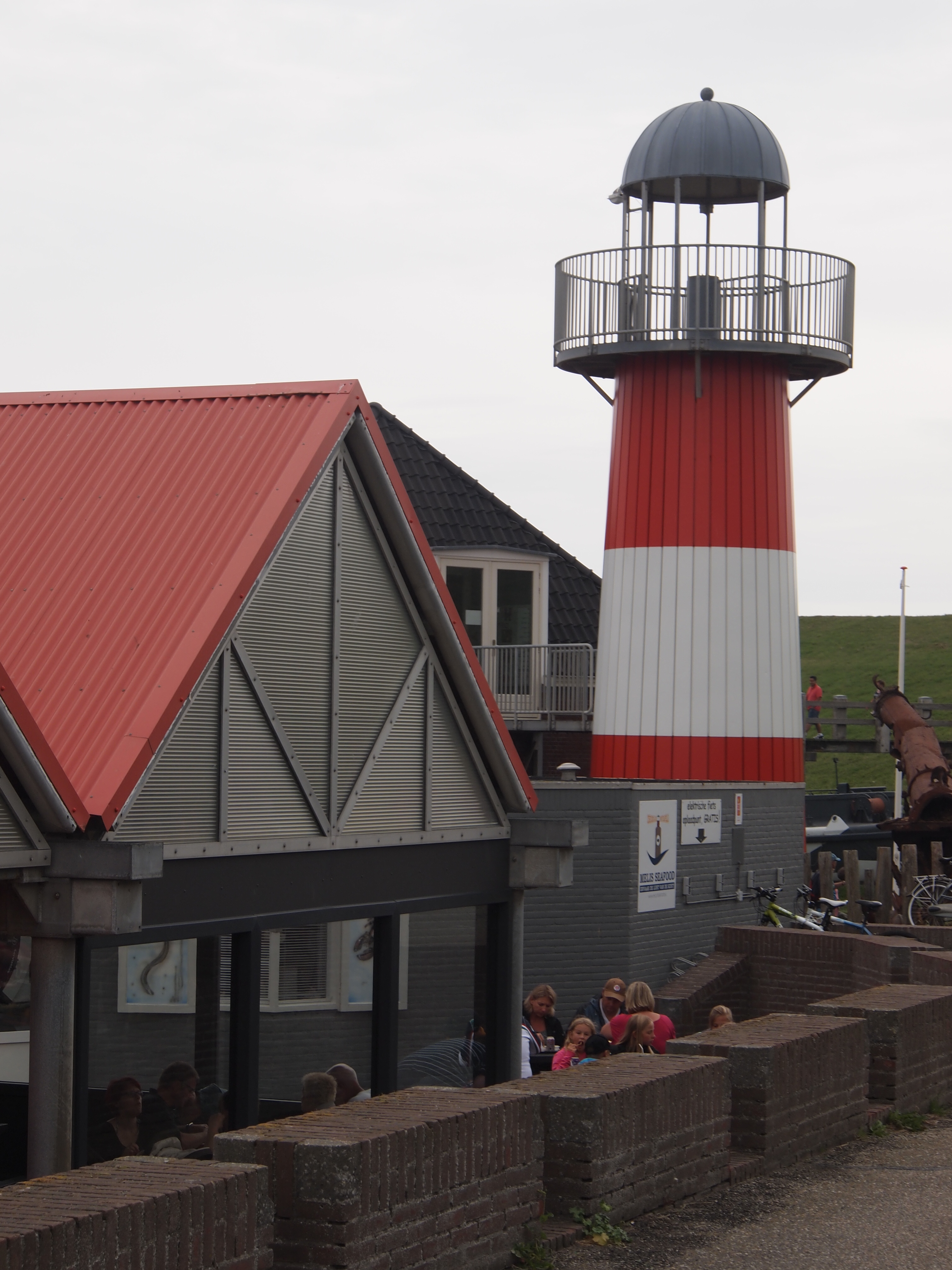 Uitkijktoren van het Museum Polderhuis Westkapelle, Zuidstraat 154-156, 4361 AK Westkapelle